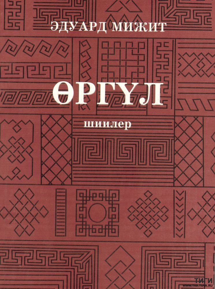 Тыва дыл: Өргүл - Эдуард Баирович МИЖИТ